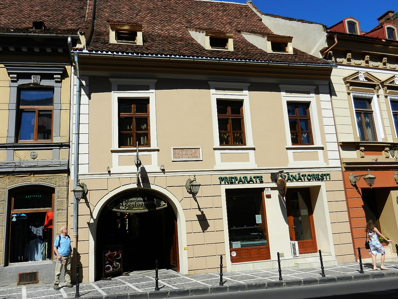 Casa Rideli